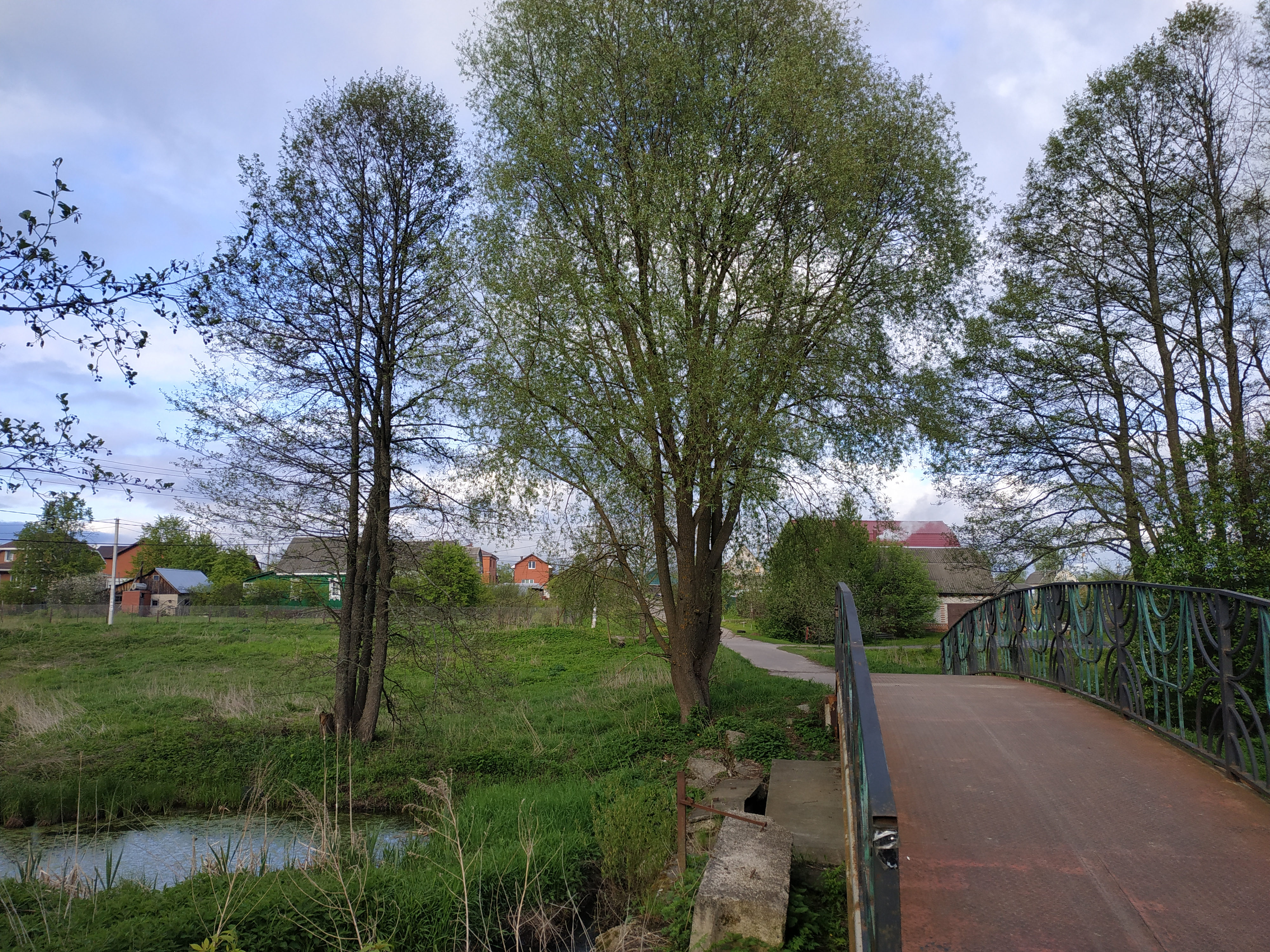 Игумново